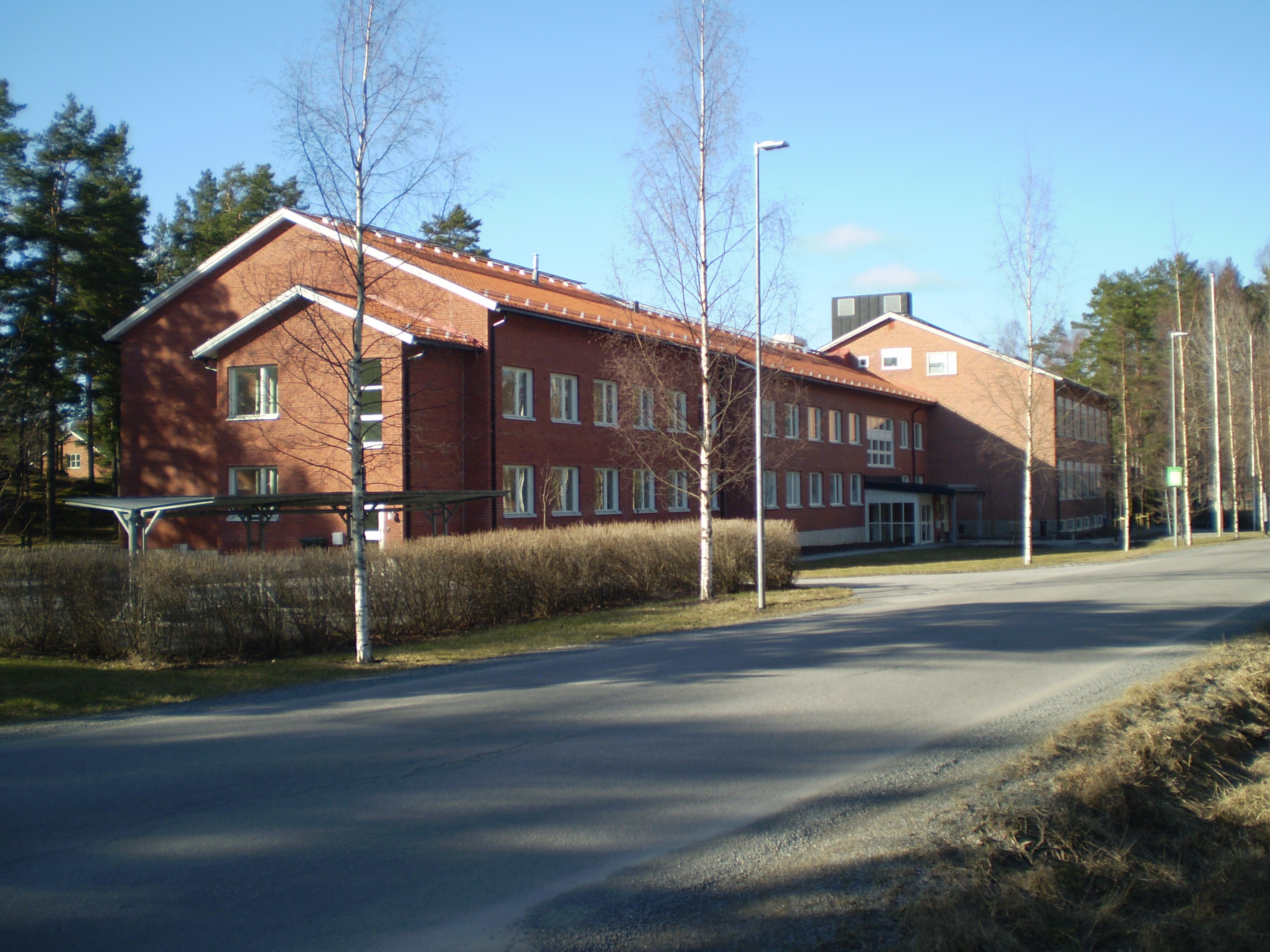 Skolkasern till Luftvärnets stridsskola och Luftvärnets officershögskola i Norrtälje, Sverige